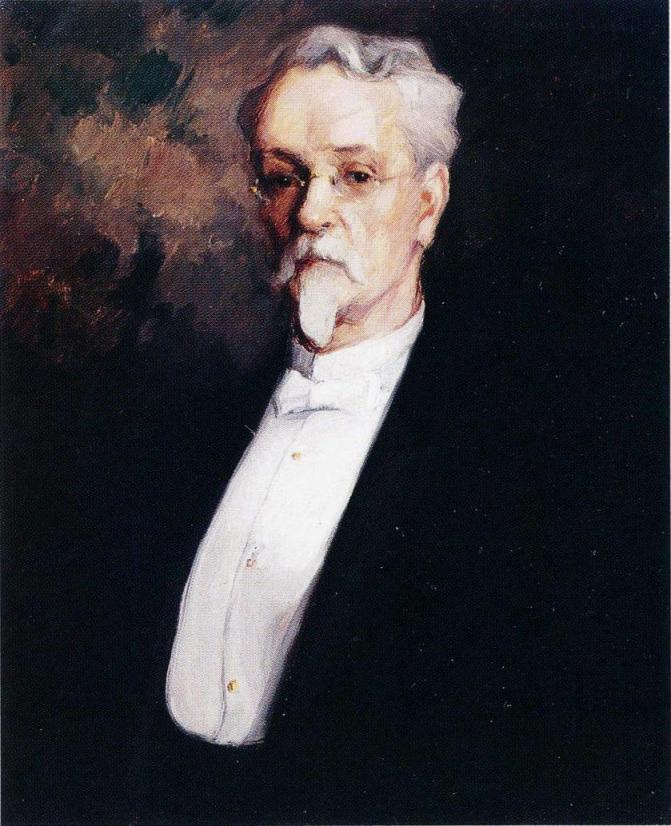 Kansallis-Osake-Pankin tilaama muotokuva hallintoneuvostonsa ensimmäisestä puheenjohtajasta Ernesti Forsmanista (1843–1922). Päiväämätön teos lienee 1910-luvulta ja saattaa olla tutkielma, jonka Sjöström on tehnyt valmistellessaan vuonna 1915 valmistunutta Viipurin hovioikeuden tilaamaa Forsmanin muotokuvaa.